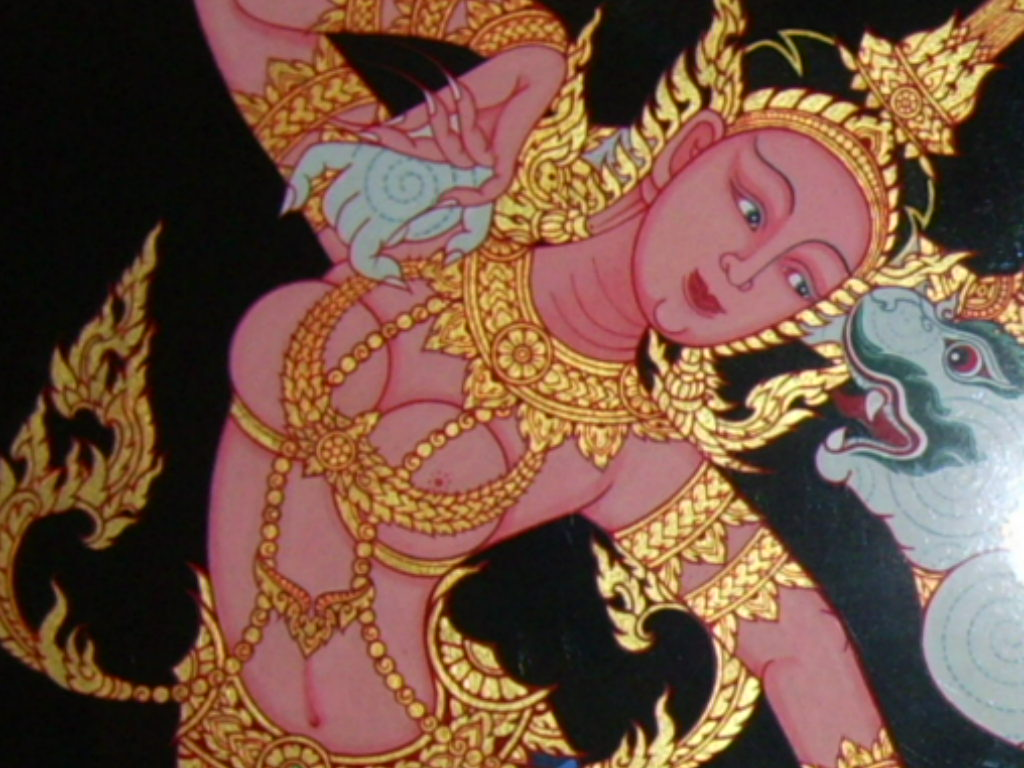 Mermaid Suvannamaccha, a mural painting of Bangkok Temple. Taken in 2007.